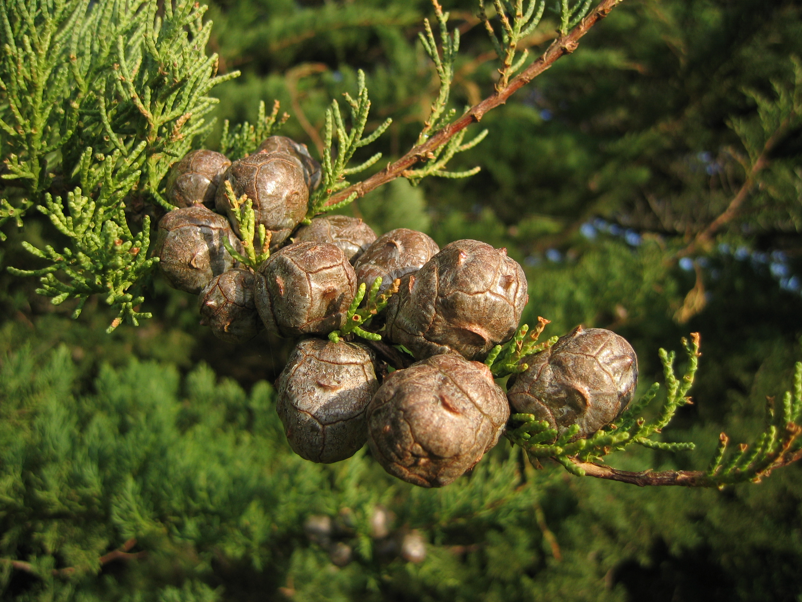 cyprès